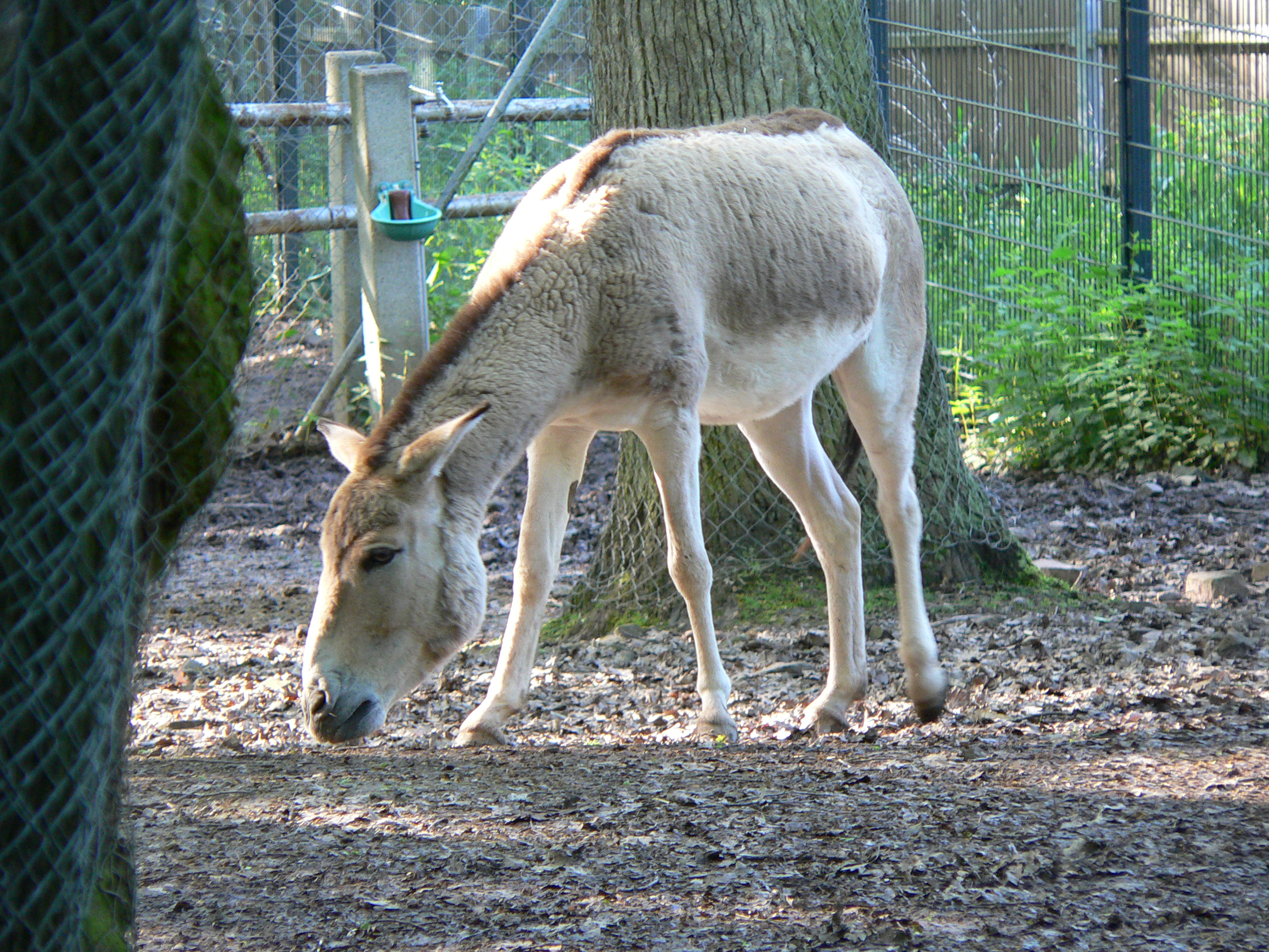 Equus hemionus kulan, Tierpark (Zoo) Pforzheim